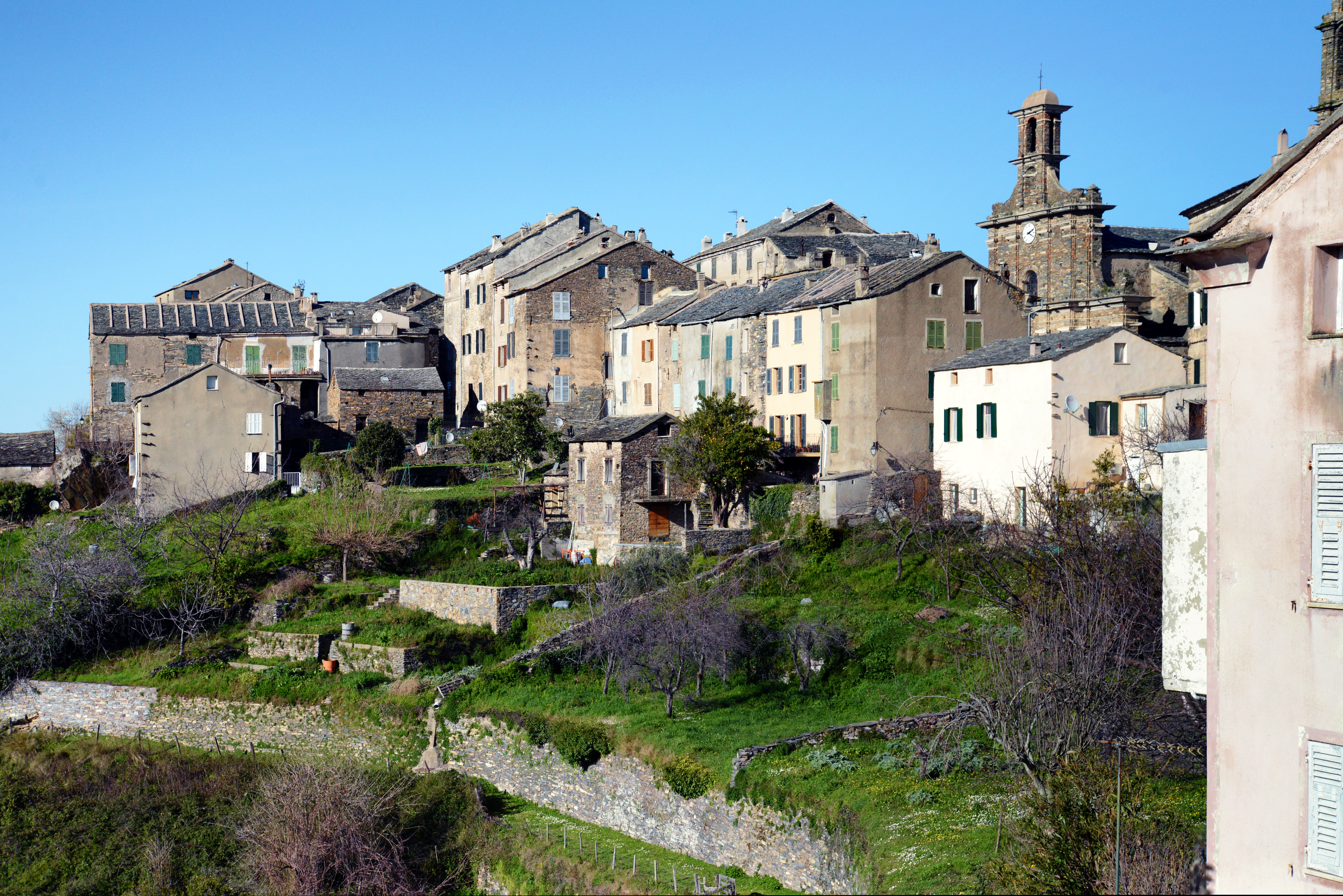 Penta-di-Casinca, Haute-Corse - Village classé en son entier